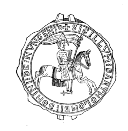 Sceau de Barthélemy II, seigneur de Nogent-en-Bassigny.